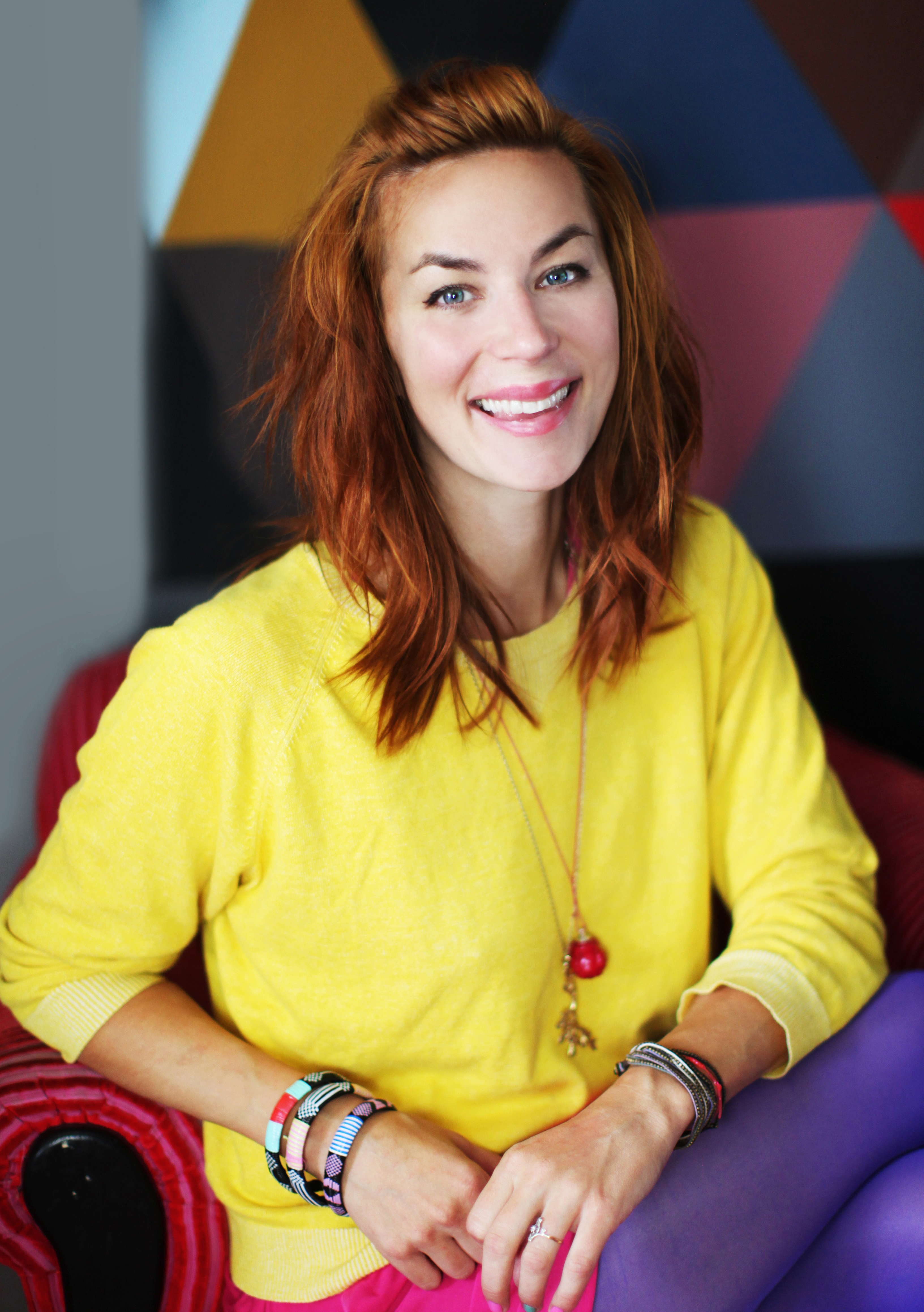 Programledaren Isabelle McAllister.